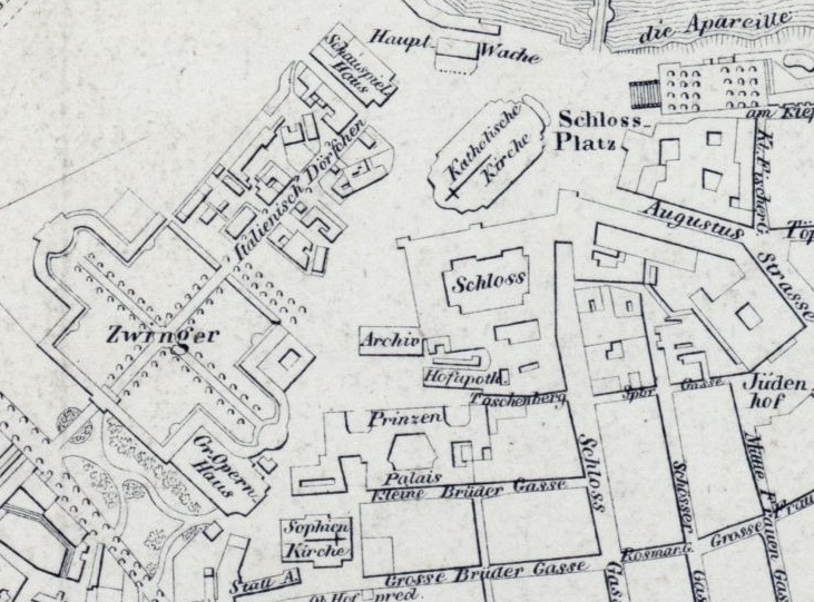 Lage des ehemaligen Opernhauses am Taschenberg (zu diesem Zeitpunkt bereits Archiv), Ausschnitt aus: Grundriss von Dresden nach der neuesten Aufnahme, 1:9 000, Lithographie, 1828